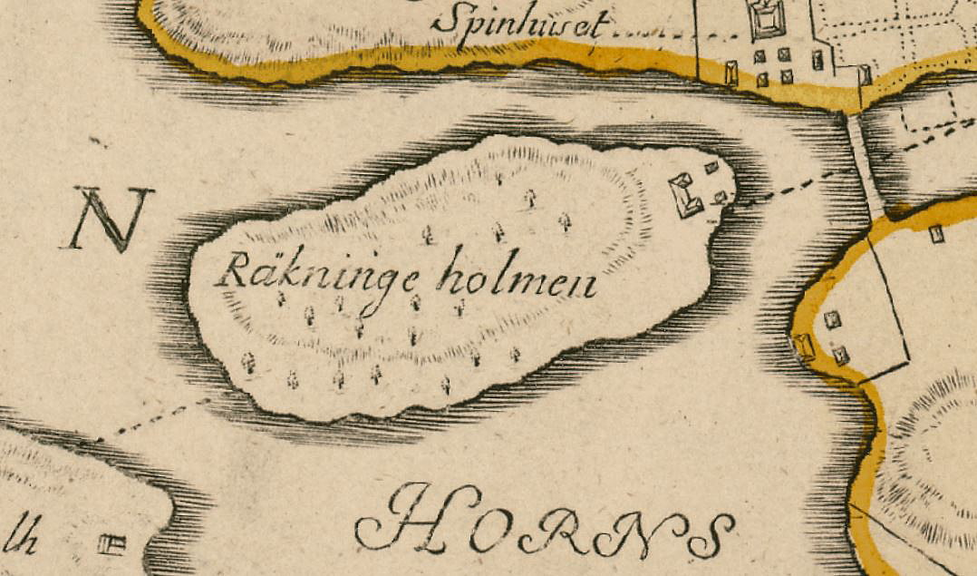 Del av 1751 års karta över Stockholm visande Räkninge holmen (Reimersholme), på östra udden syns Reimers Malmgård